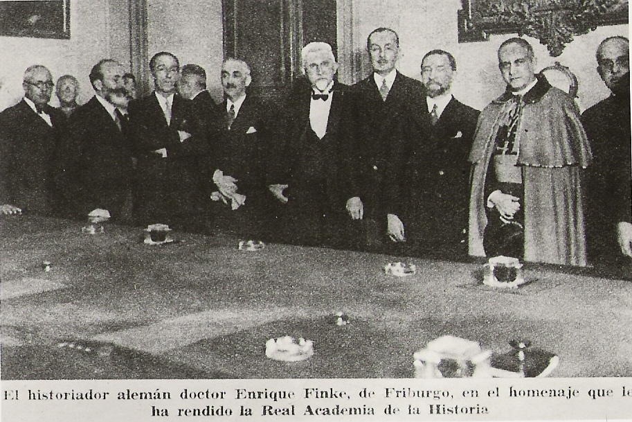 Heinrich Finke (Mitte) bei einer Ehrung der Real Academia de la Historia, um 1925